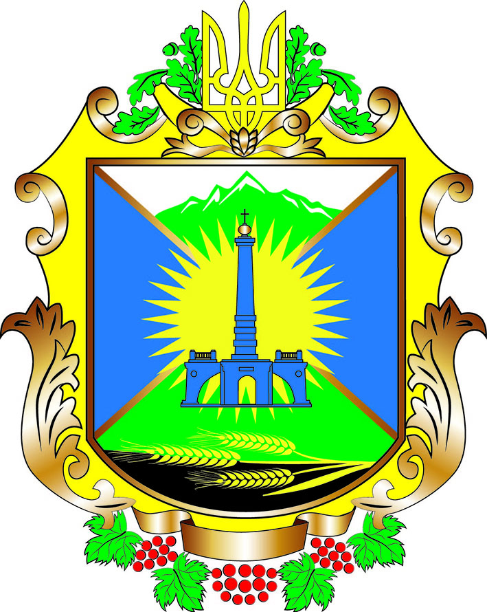 Герб Чемеровецької ОТГ